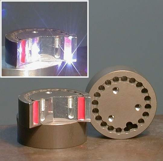 Laserbearbeitung (Schnitt durch ebenes Lagerelement)